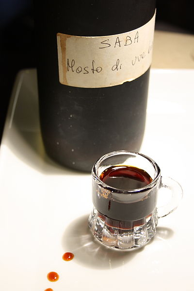 Bottiglia di Saba fatta in casa nel 1990, bicchierino e alcune gocce sul vassoio di porcellana